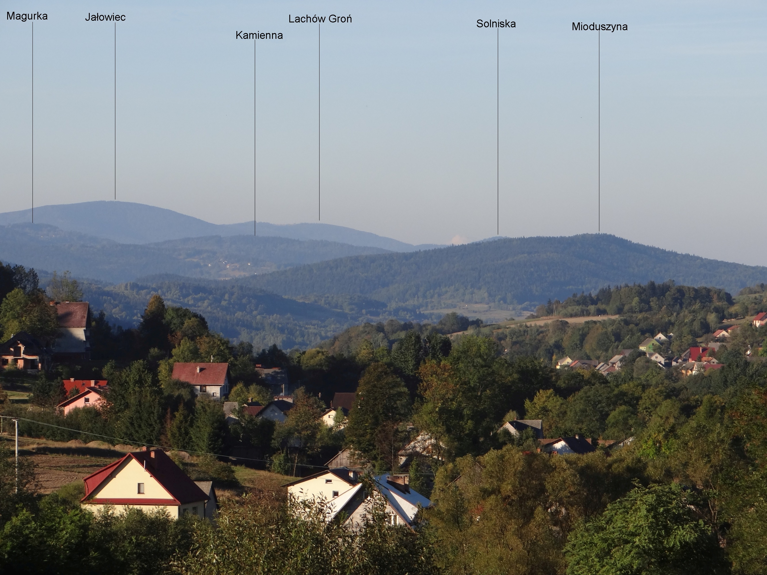 Widok z okolic Przełęczy Sanguszki